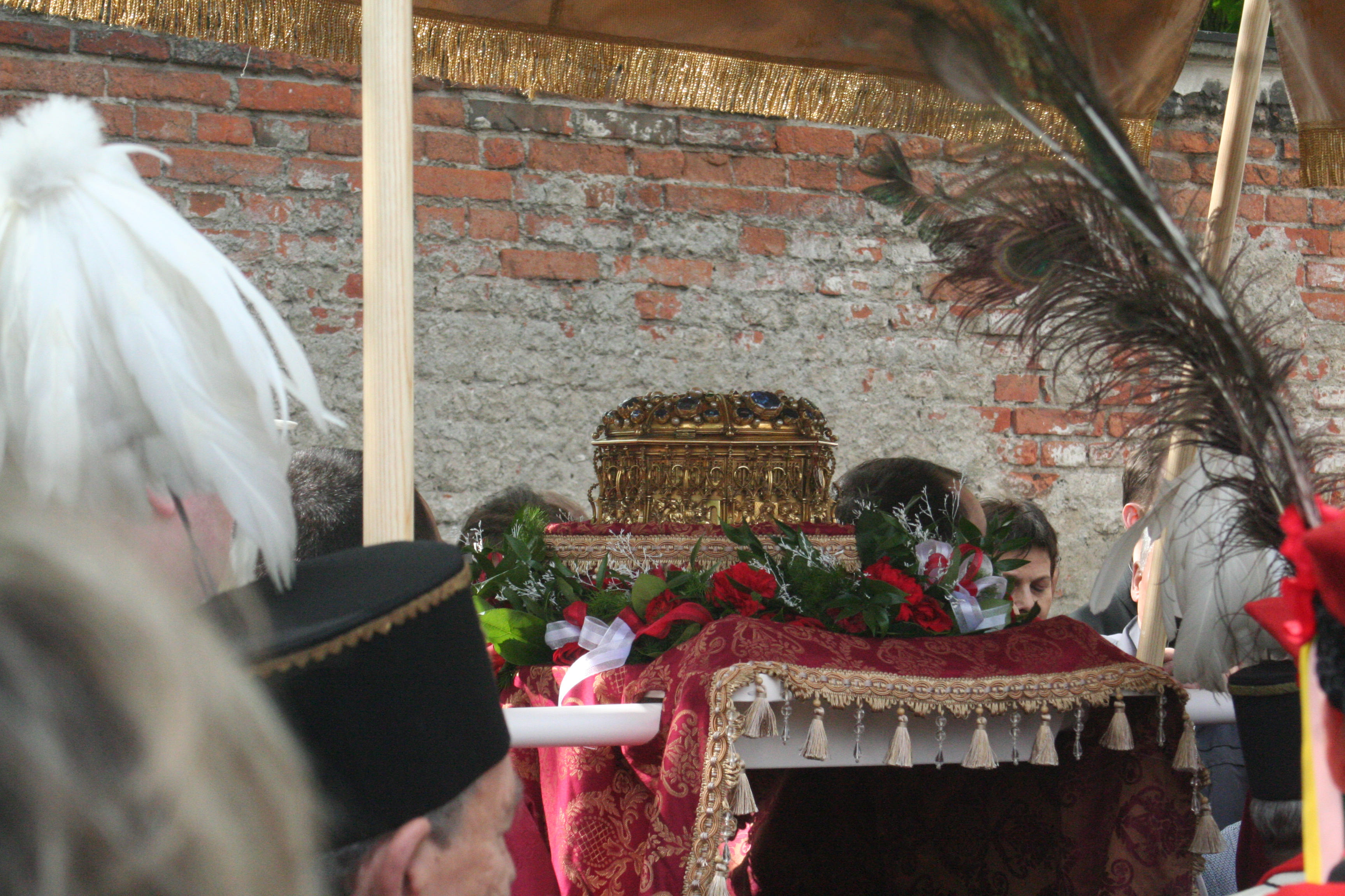 Tradycyjna Procesja ku czci św. Stanisława z Wawelu na Skałkę. Relikwiarz głowy świętego Stanisława